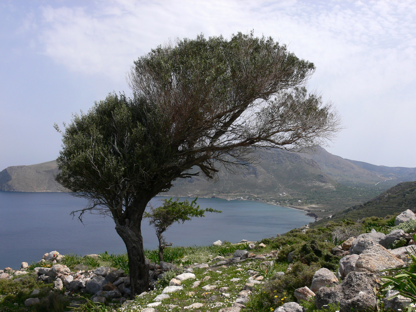 Wanderweg zwischen dem Kloster Agios Panteleimonas und dem Kloster Kamari.